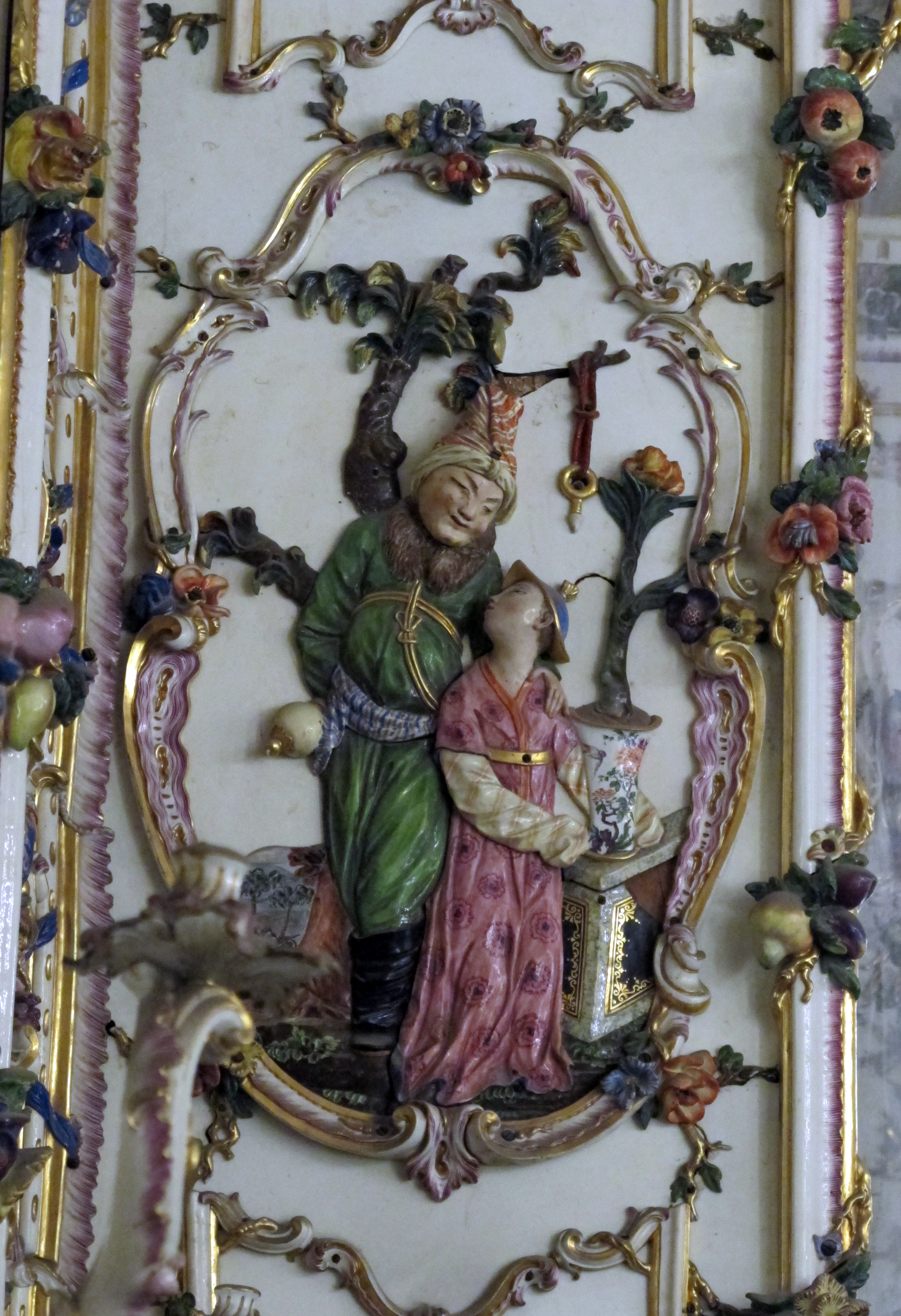 Appartamento Reale (Museo di Capodimonte)